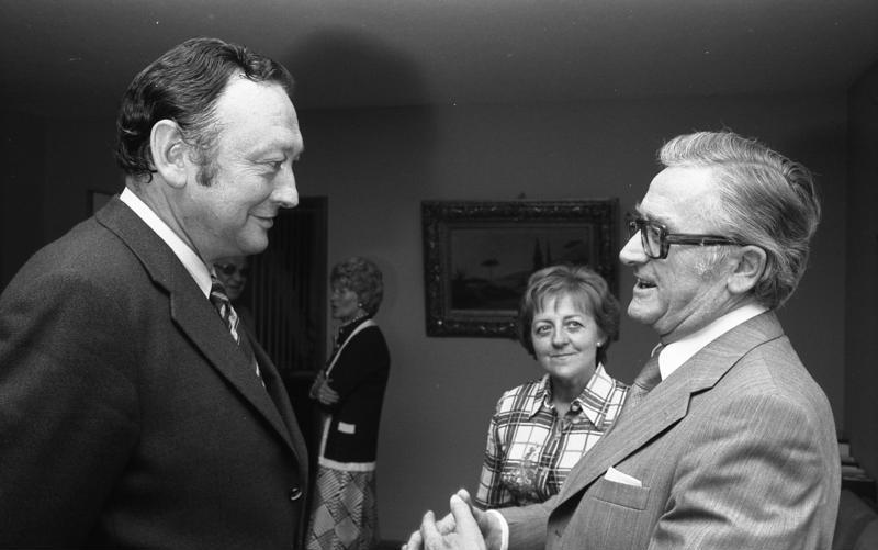 Bundesratsdirektor Dr. Albert Pfitzer gibt Empfang in seinem Haus in BN-Bad Godesberg (links: Karl Jung)